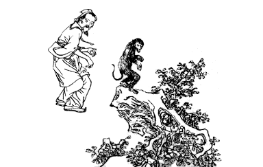 Hua Tuo/Wu Chin Hsi (reprodução de um antigo desenho chinês)